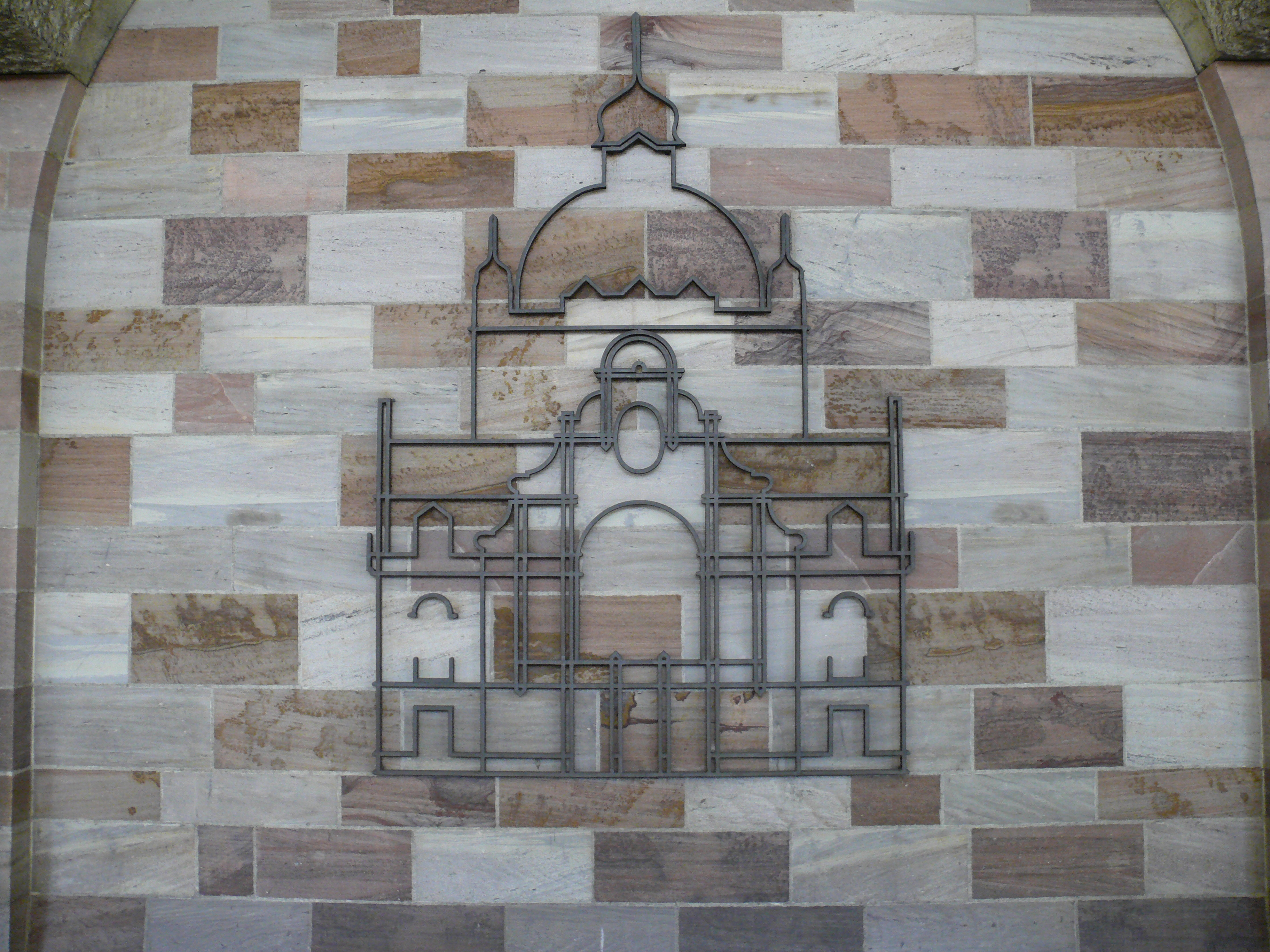 Gusseiserne Nachbildung an der Bahnsteigwand am U-Bahnhof Opernhaus in Nürnberg.